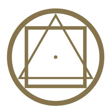 Nový znak Lectorium Rosicrucianum